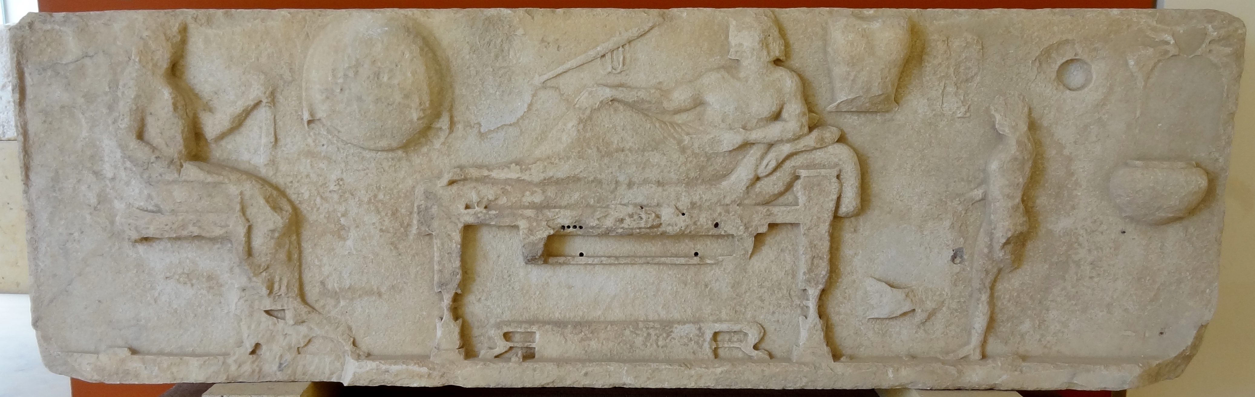 Reliefstele (ca. 500 v. Chr.), den Poeten Archilochos auf einer Couch und seine sitzende Ehefrau darstellend, im Archäologischen Museum von Parikia auf Paros, Kykladen, Griechenland